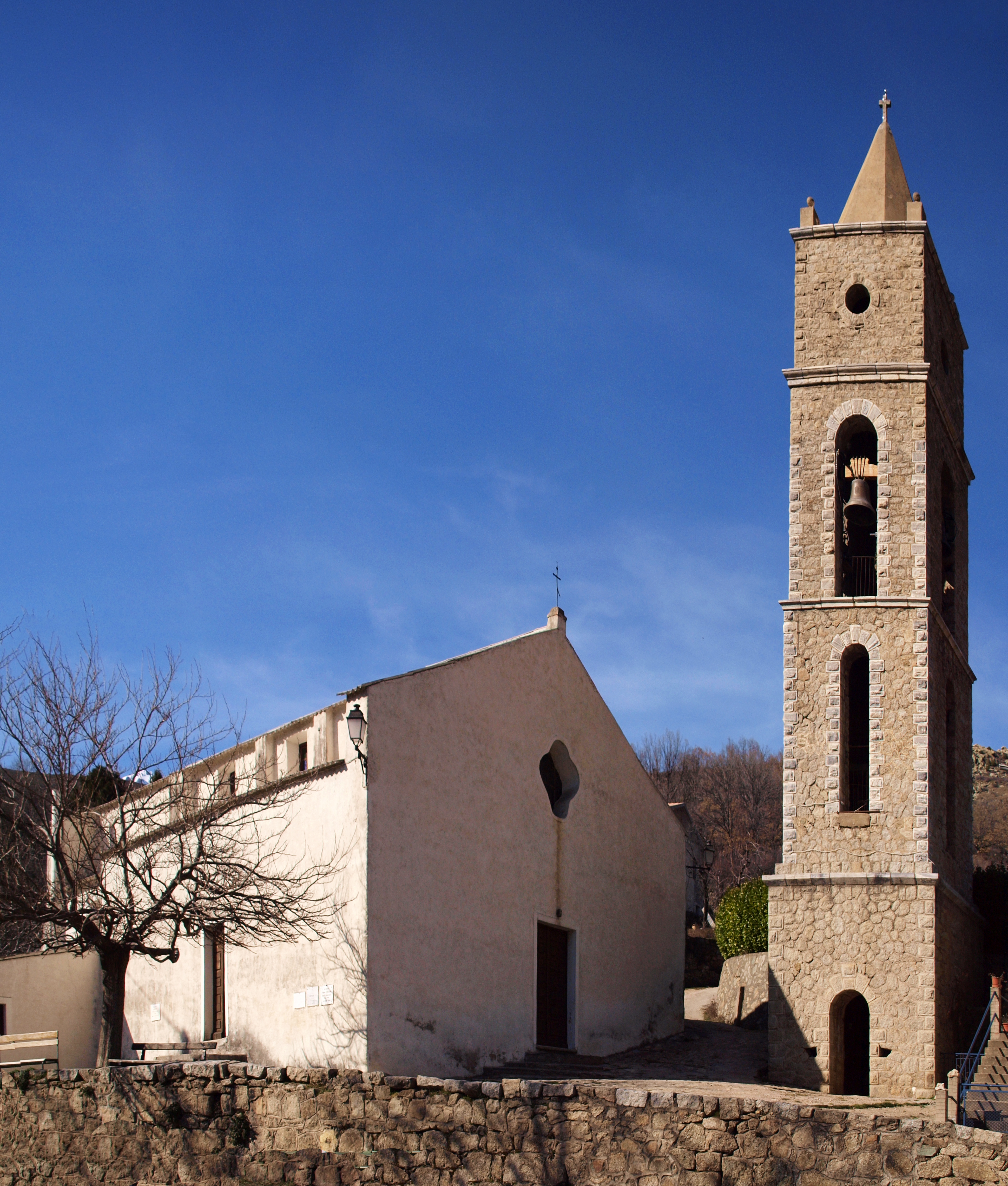 Albertacce (Corsica) - Église paroissiale Santa Maria